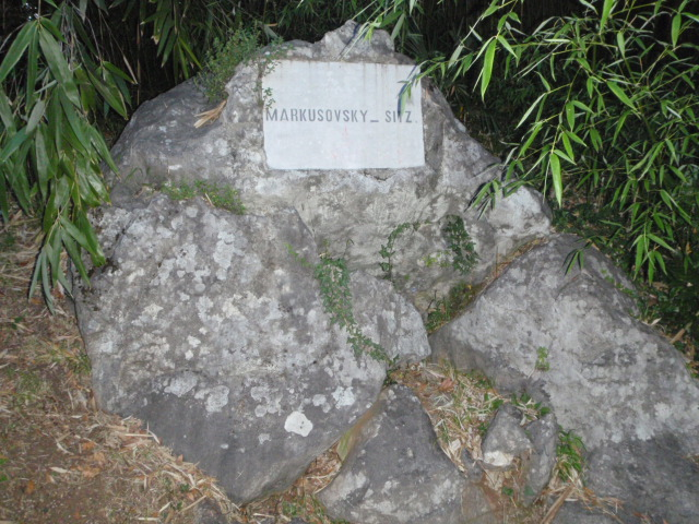 Markusovsky-Sitz, hinter dem Hotel Opatija, Margaretha Park